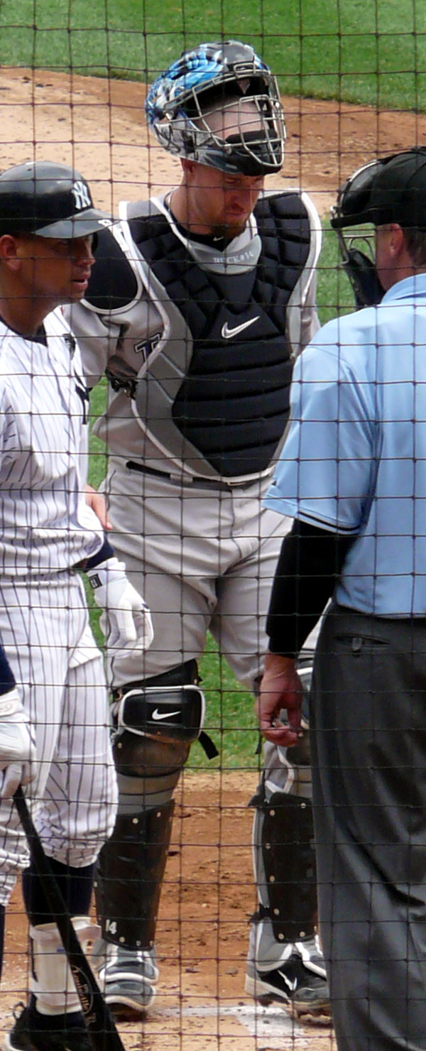 John Buck